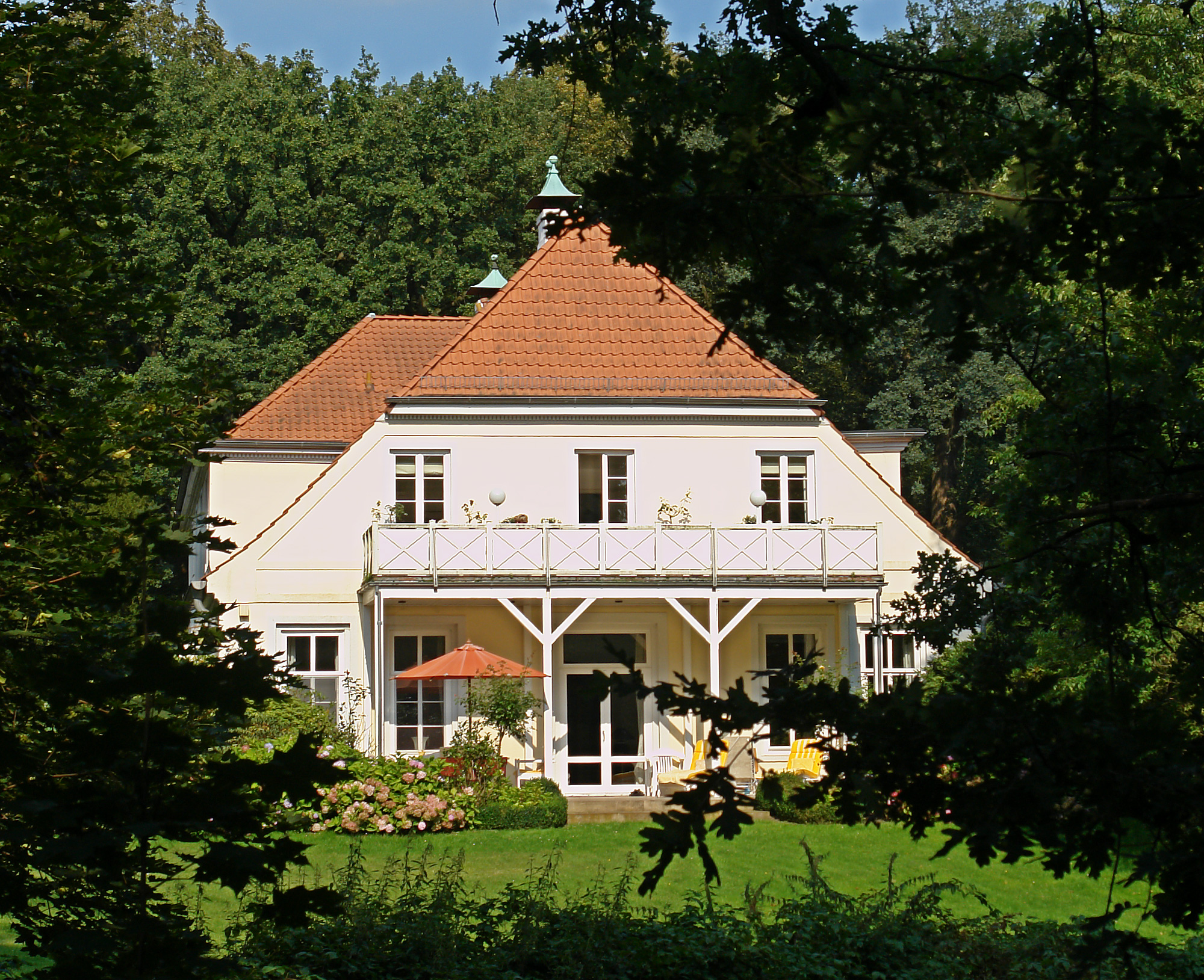 Landhaus Böving in Bremen, Oberneulander Landstraße 65.Das abgebildete Objekt ist ein geschütztes Kulturdenkmal in der Freien Hansestadt Bremen, mit der Nr. 1730 beim Landesamt für Denkmalpflege registriert.